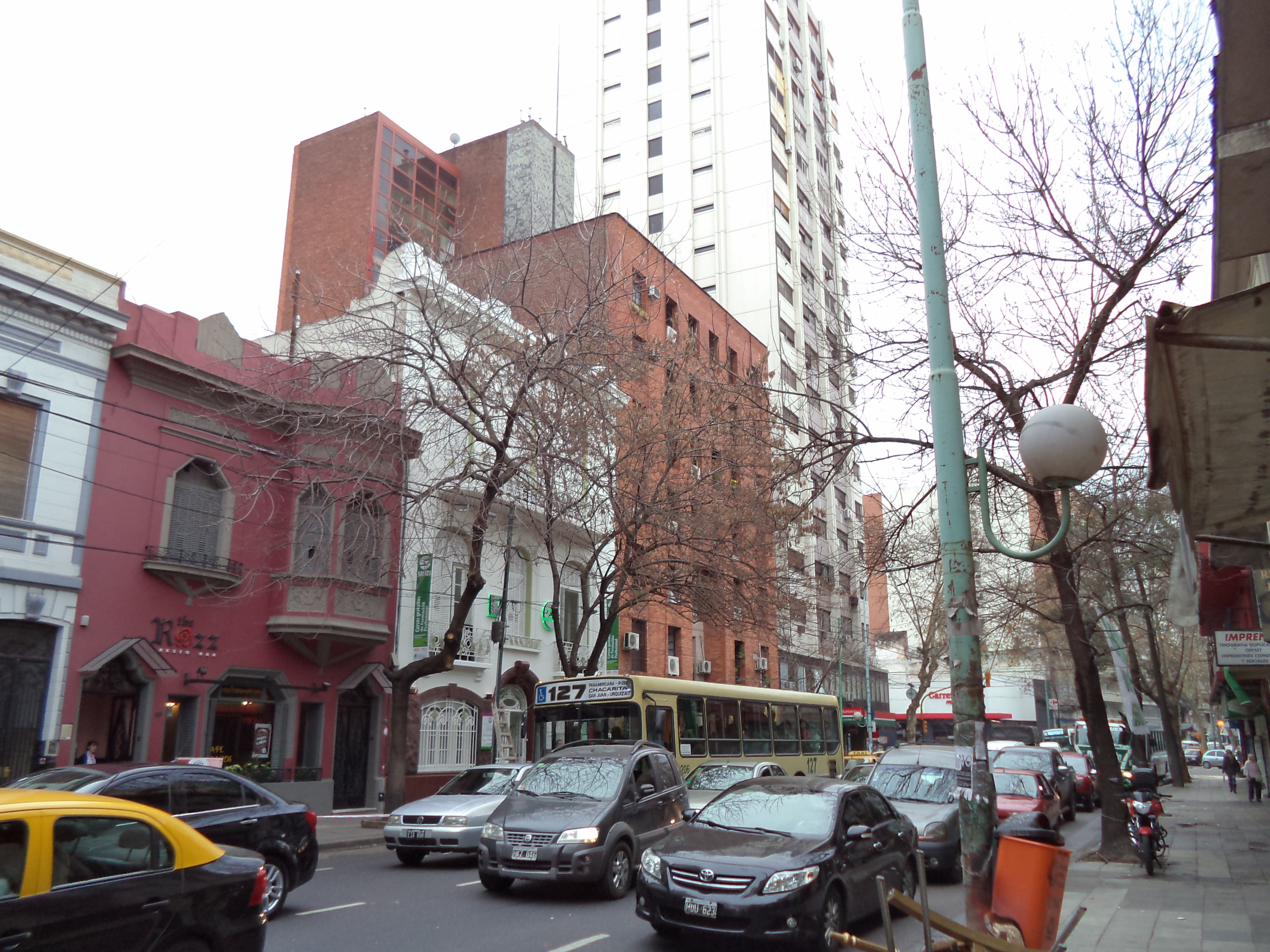 Vista de la Avenida Medrano al 100, desde la calle Mitre hacia Díaz Vélez. Buenos Aires.